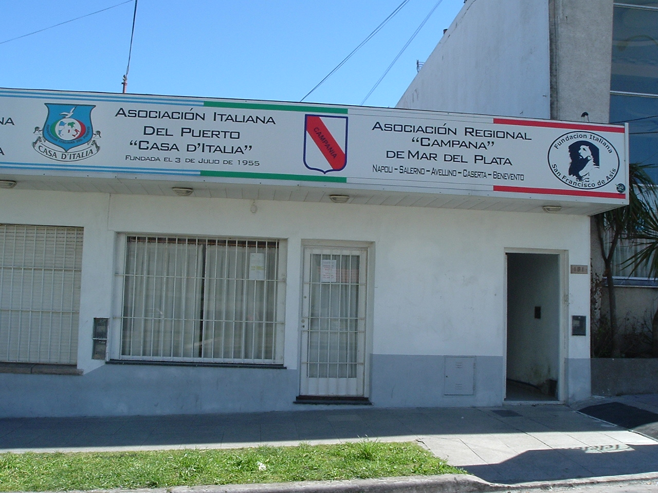 Casa d'Italia Campana de Mar del Plata